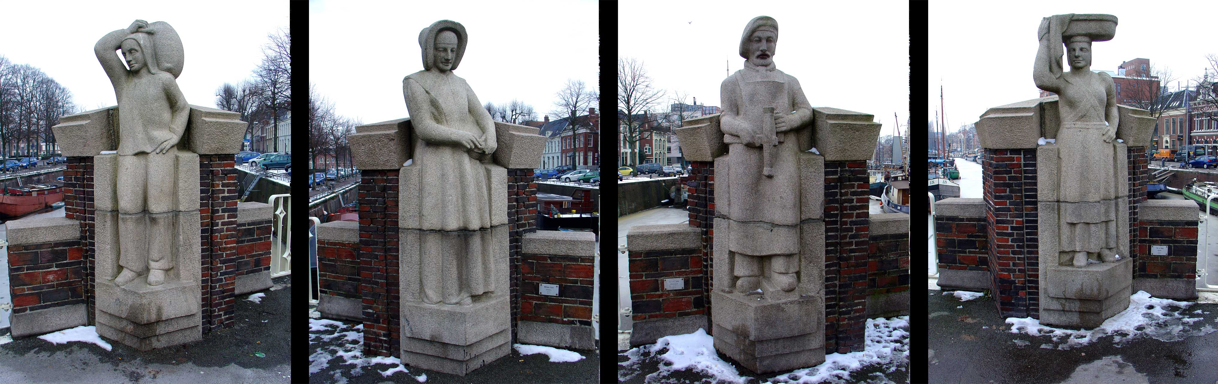 Korendrager, koopvrouw, scheepsbouwer en visvrouw - Kijk in 't Jatbrug Groningen in 1942/1943 gemaakt door Willem Valk Groningen